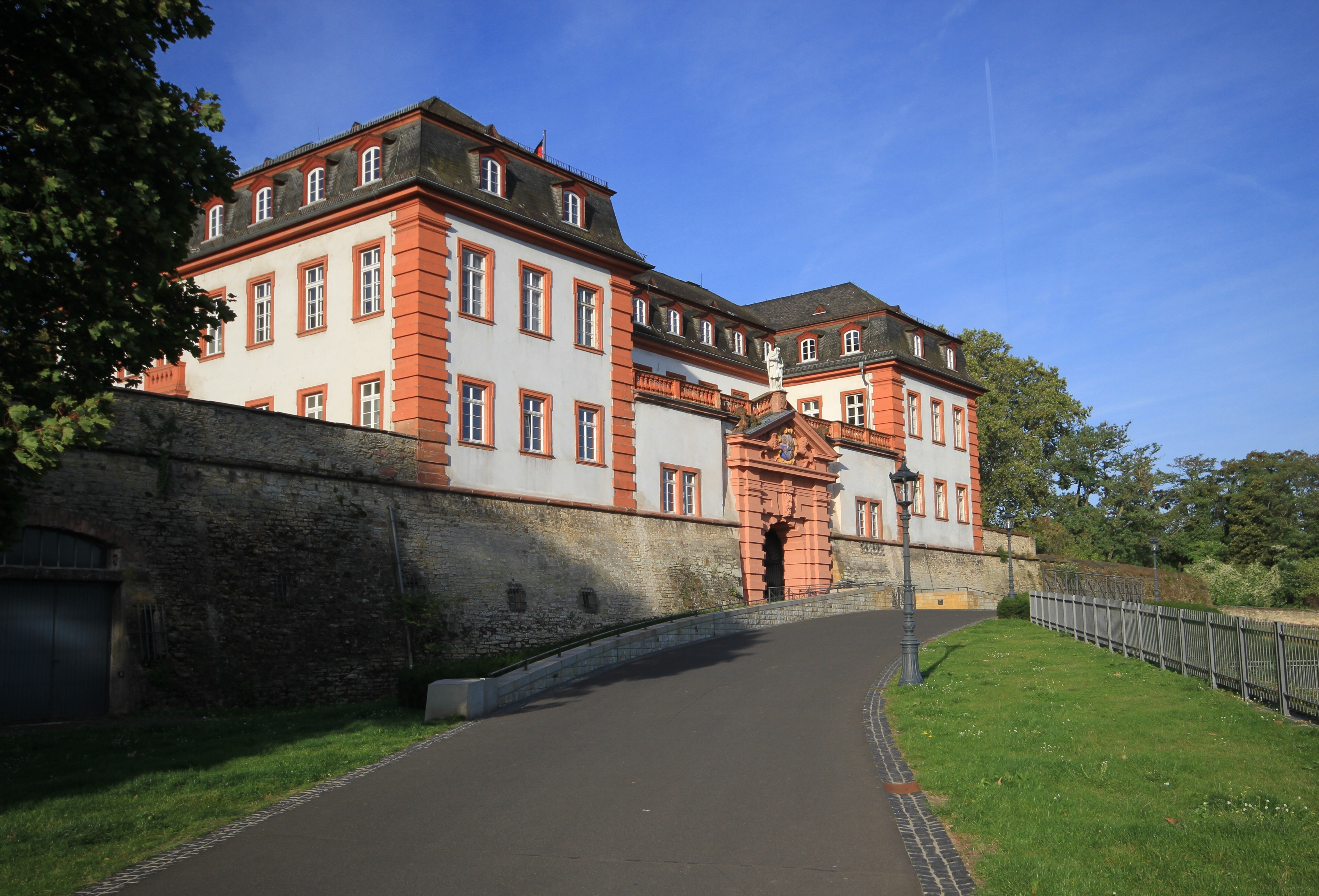 Kommandantenbau der Zitadelle Mainz